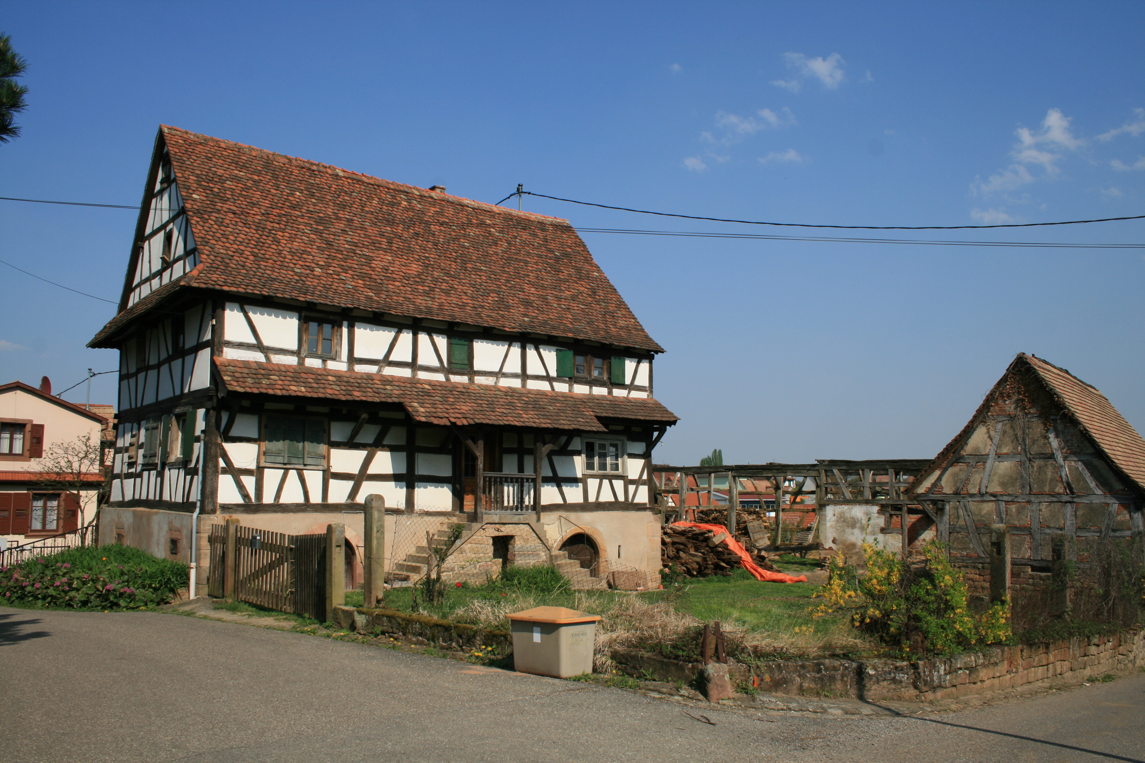 Lampertsloch, Alsace